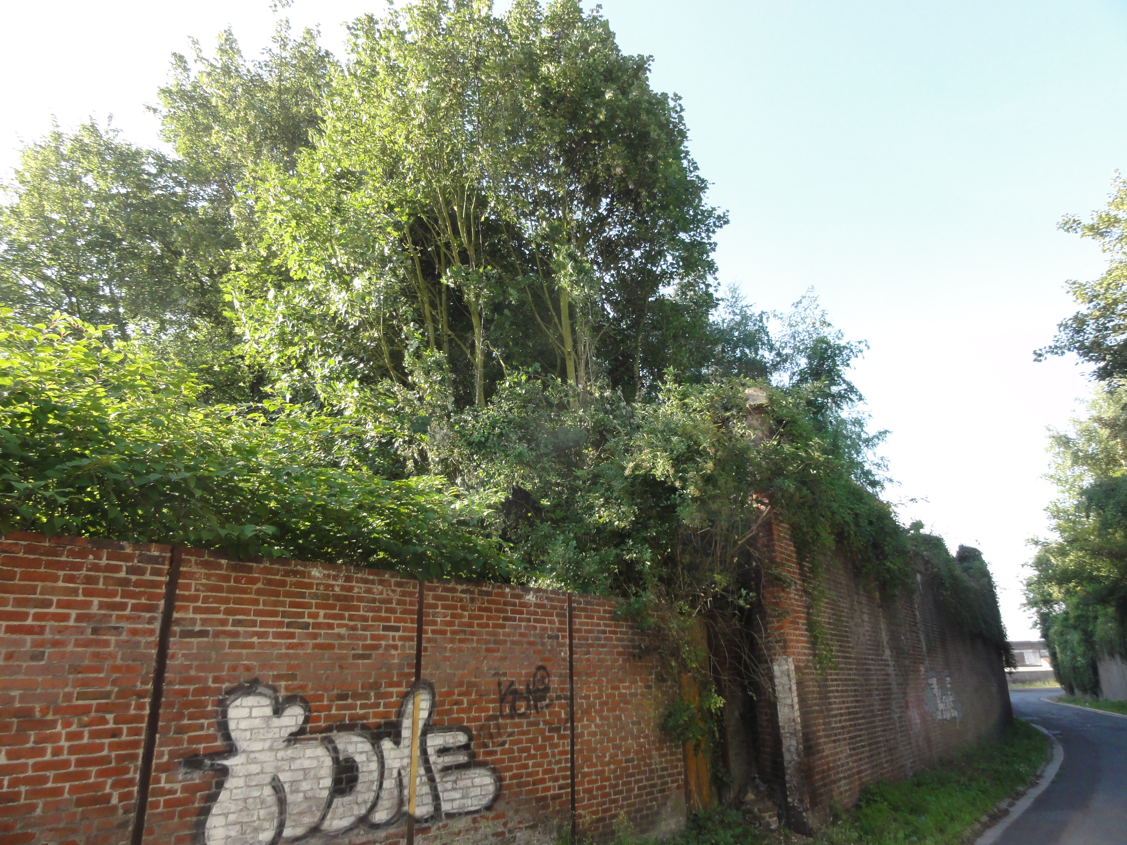 Terril n° 252 dit Cavalier du siège Notre Dame, Fosse Notre Dame de la Compagnie des mines d'Aniche, Sin-le-Noble, Nord, Nord-Pas-de-Calais, France.